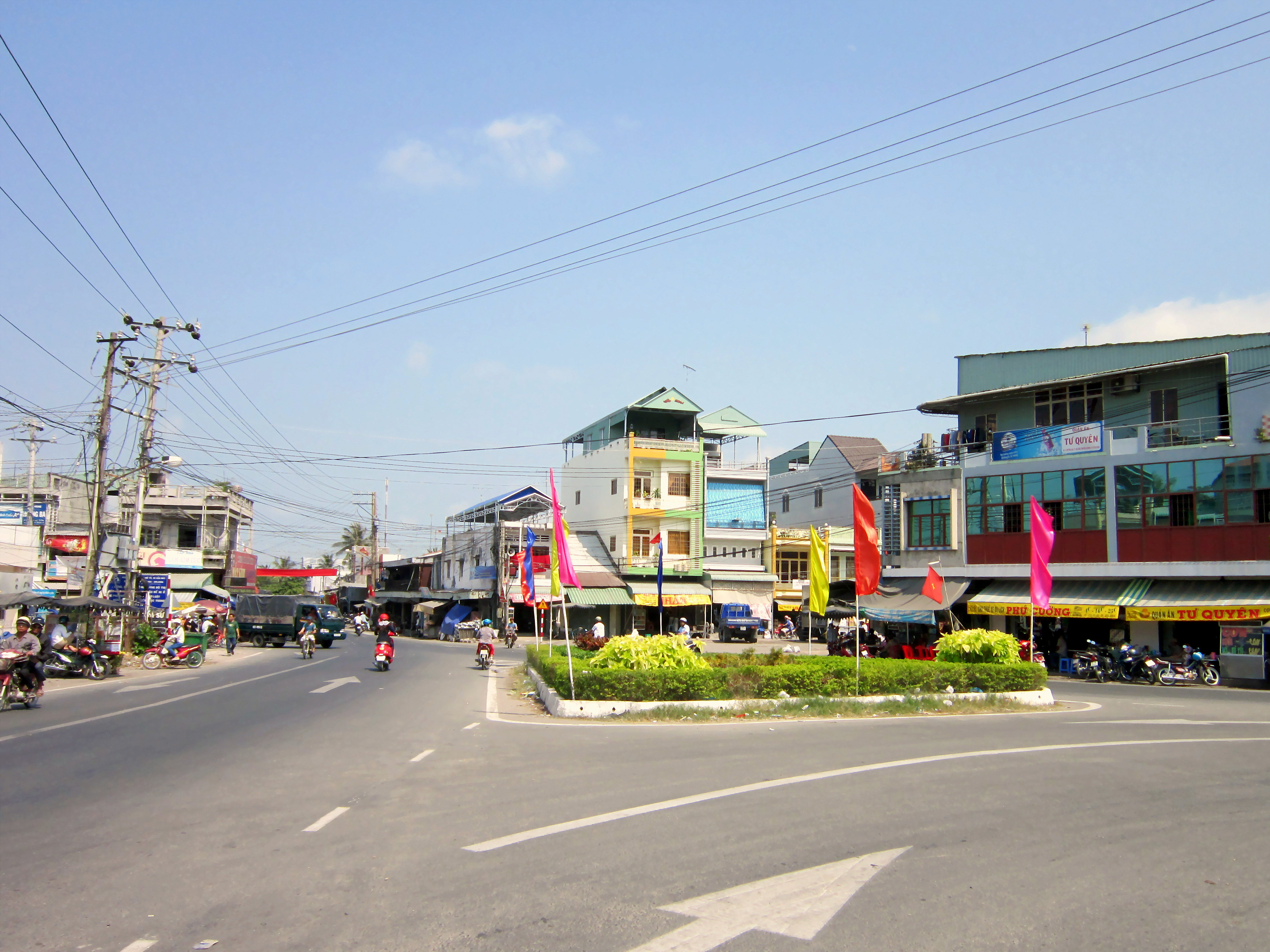 Cảnh ở khu vực chợ Nhà Bàng ở thị trấn Nhà Bàng, huyện Tịnh Biên, An Giang, Việt Nam.